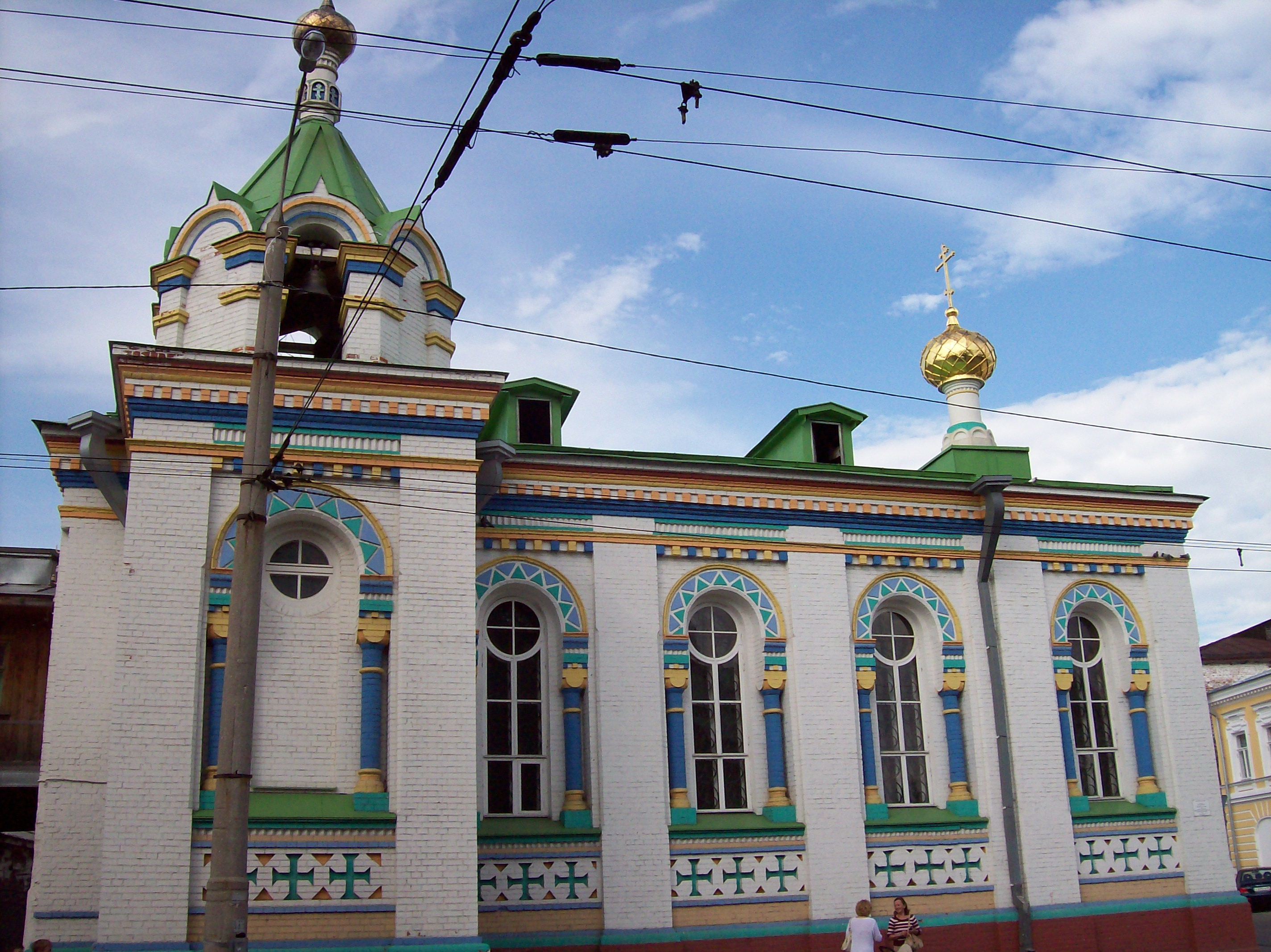 Никольская церковь, Архангельск, июнь 2007